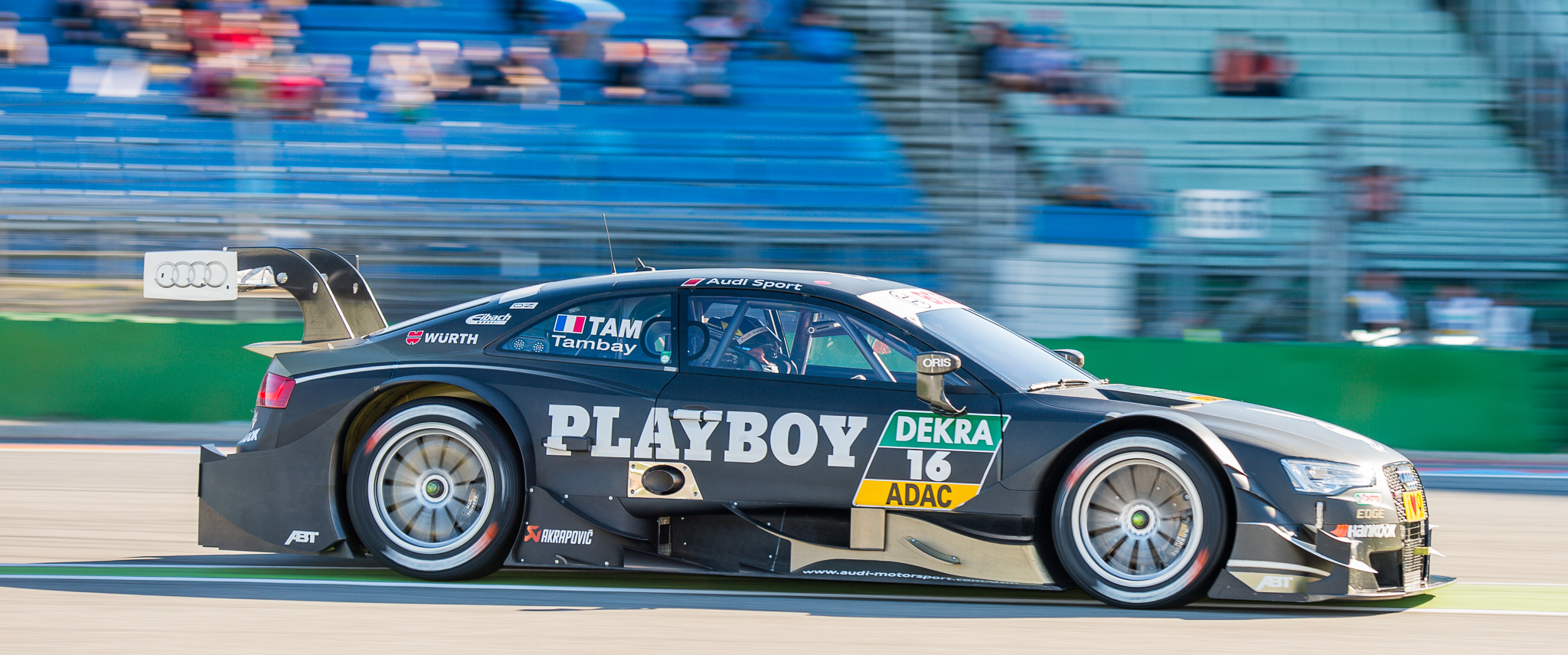 Abt Sportsline GmbH,Adrien Tambay,DTM,Deutsche Tourenwagen Masters,Hockenheimring,Motorsport,Playboy Audi RS 5 DTM